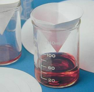 Česky: Ukázka filtrace